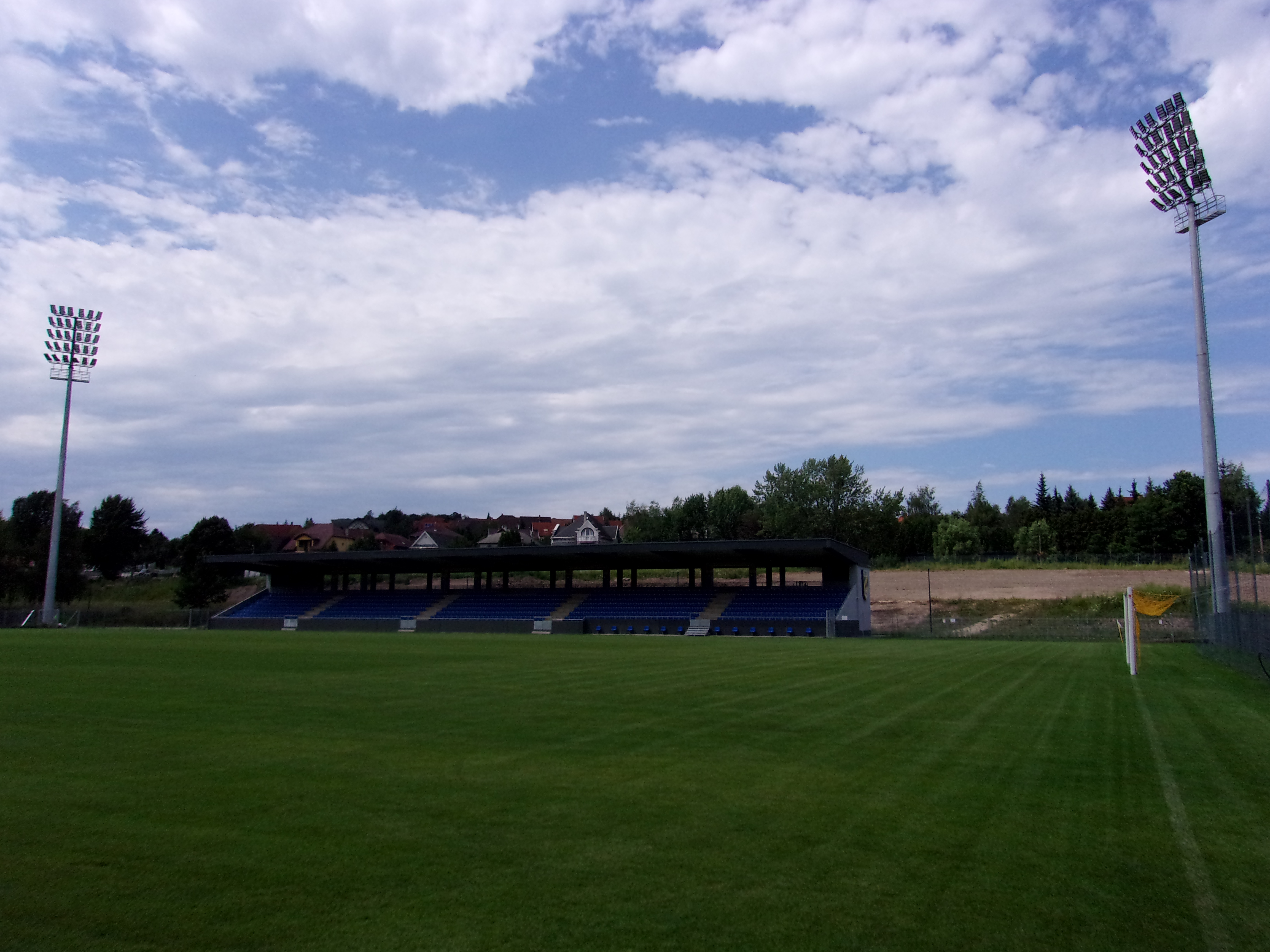 A Kolorcity Kazincbarcika SC stadionja 2020-ban